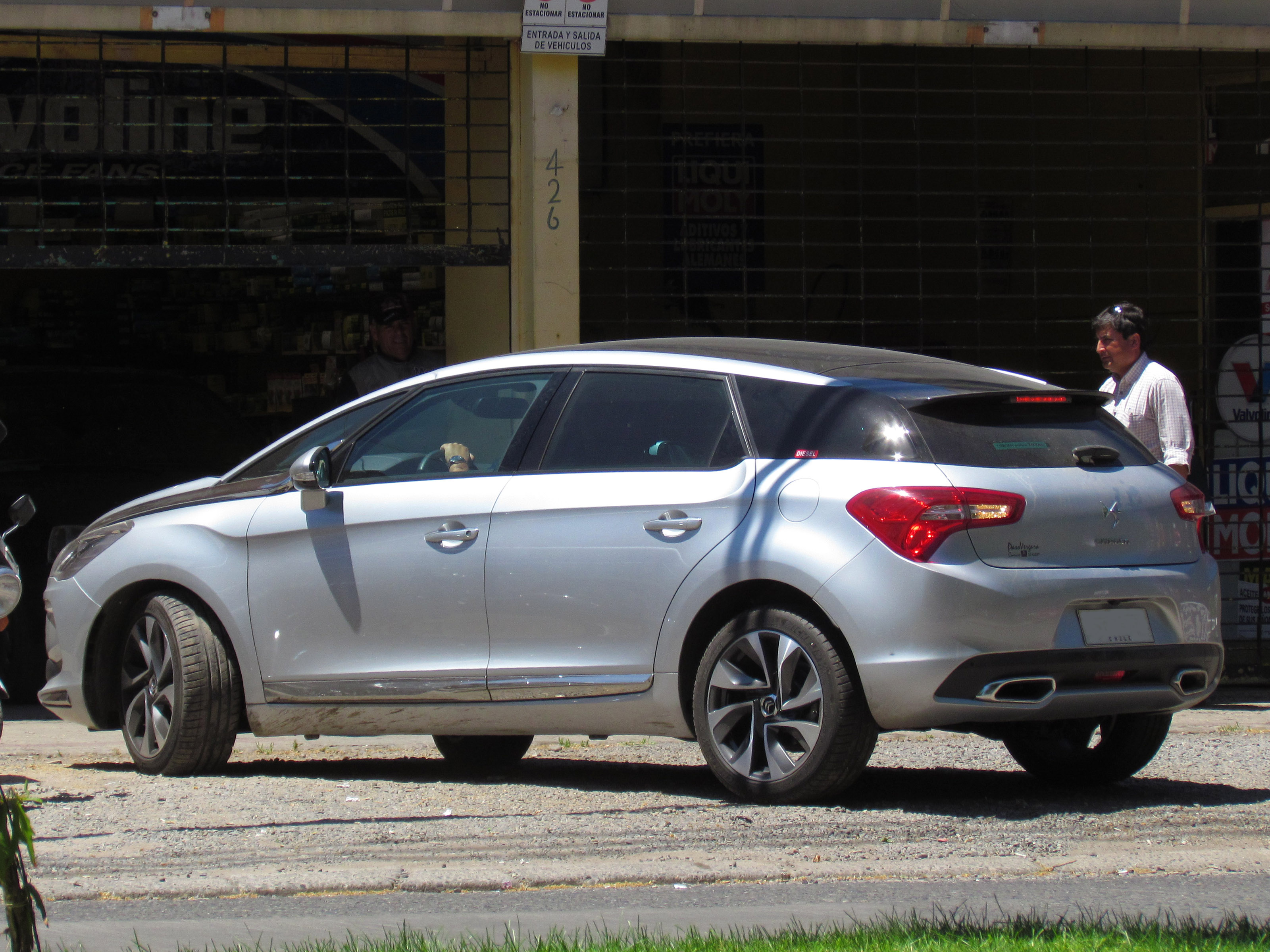 Citroen DS5 2.0 HDi 2015